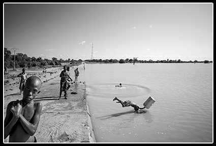 Burkina Faso, sur la route de Mahadaga, 2017